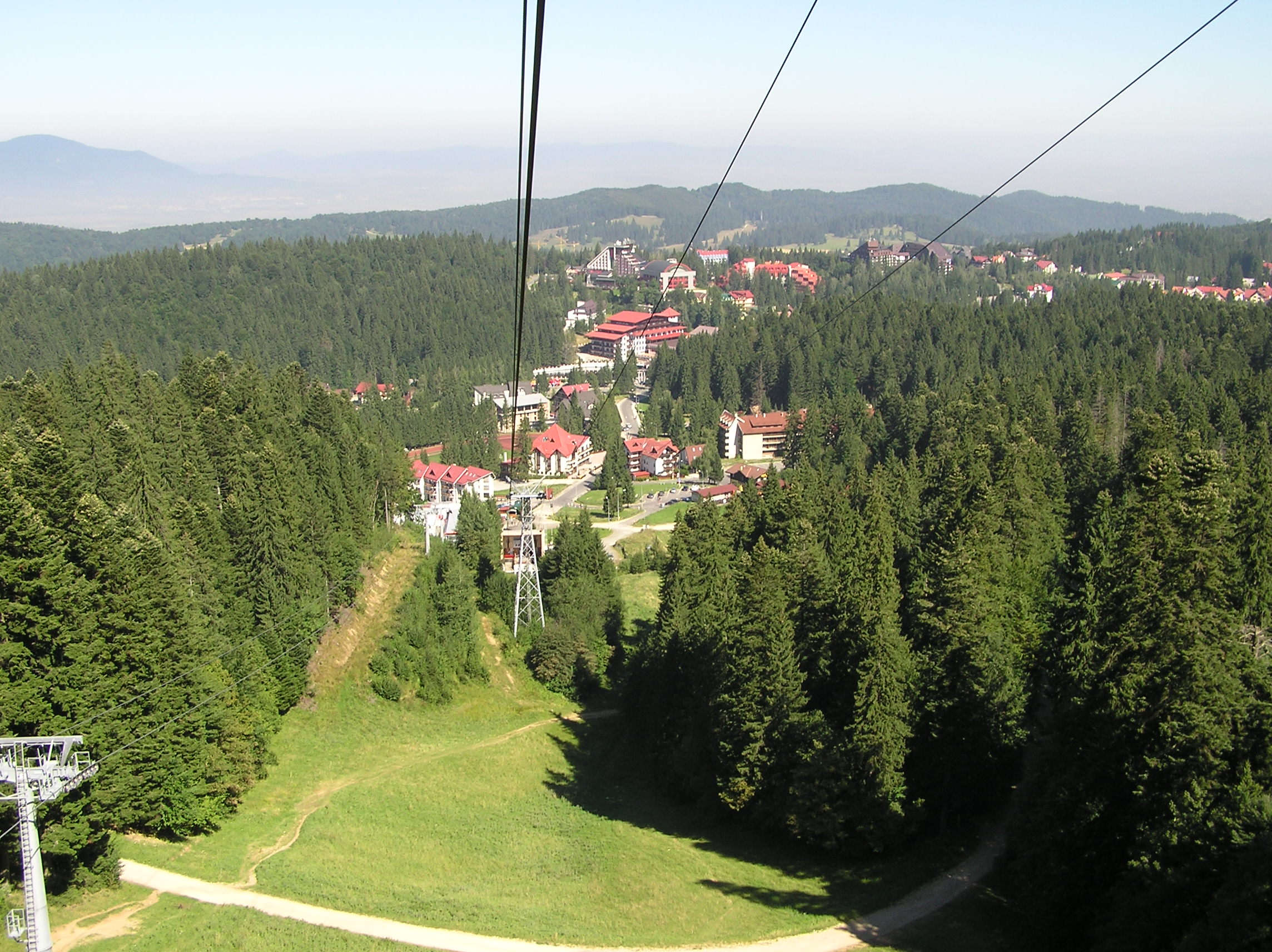 Sicht auf die Poiana Brașov / Schulerau, Siebenbürgen, Rumänien.